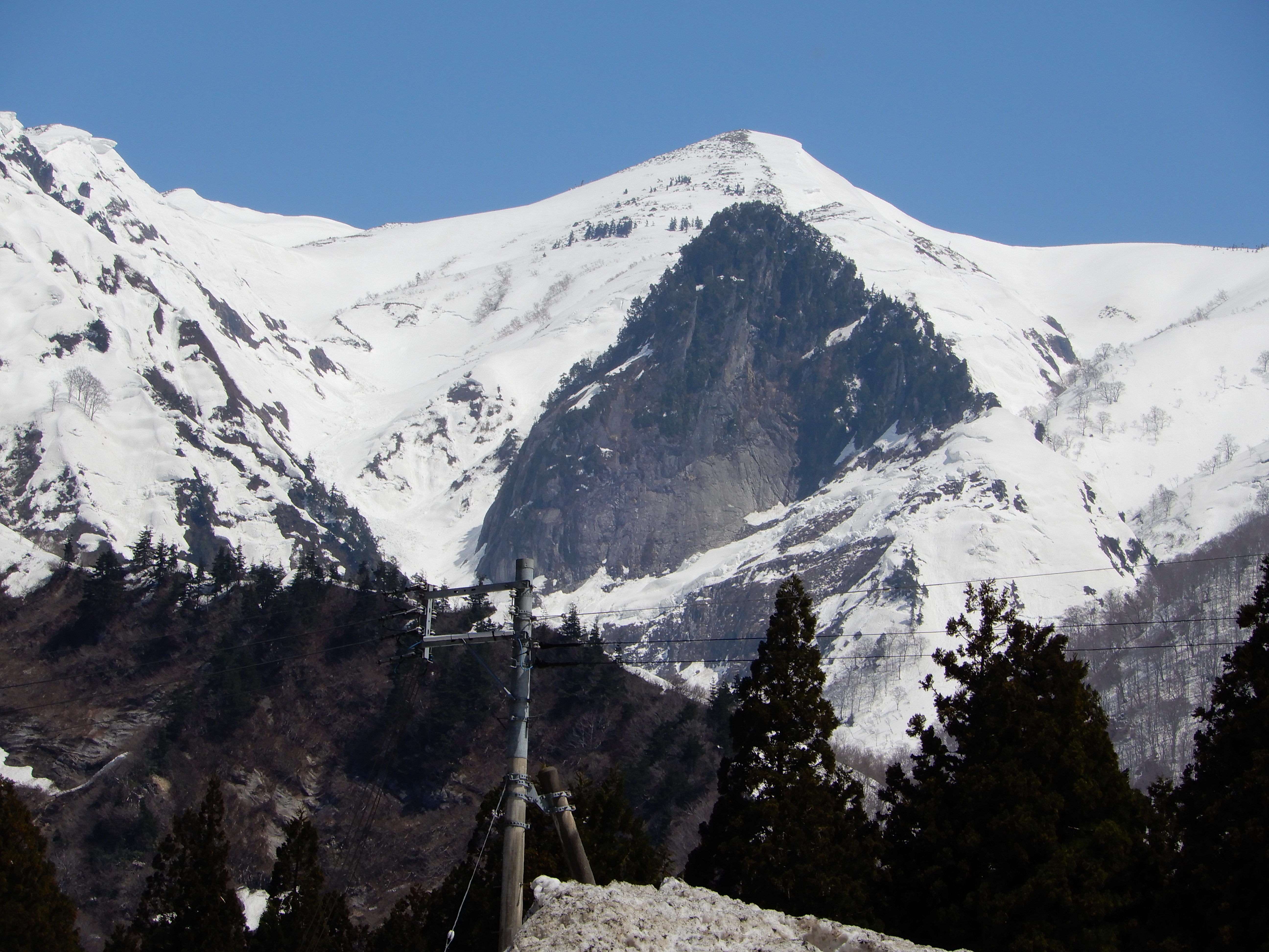 清水より、割引岳・天狗岩（2019.04.18）